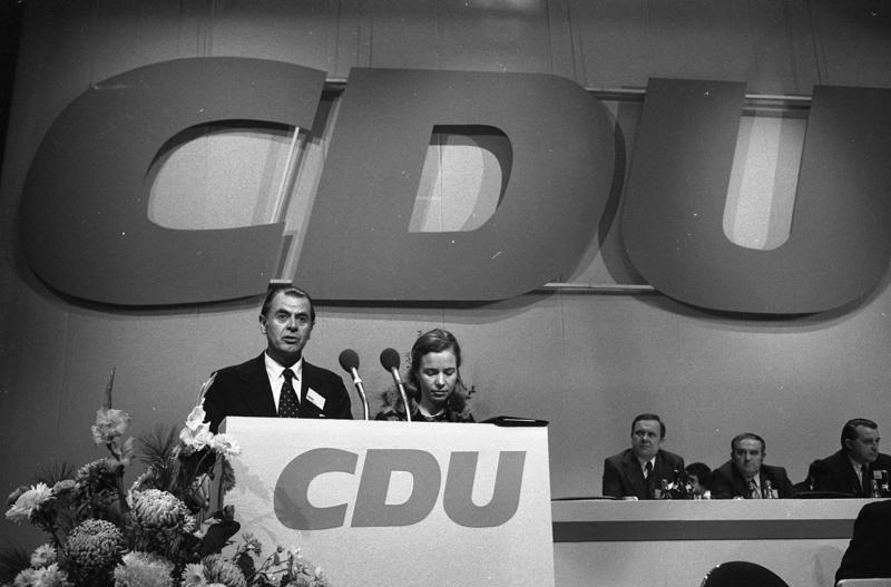 22. Bundesparteitag der CDU in Hamburg (Patricio Alwyn, Gen.-Sekr. d. Christl. Demokr. Partei v. Chile) 18.-20.11.1973